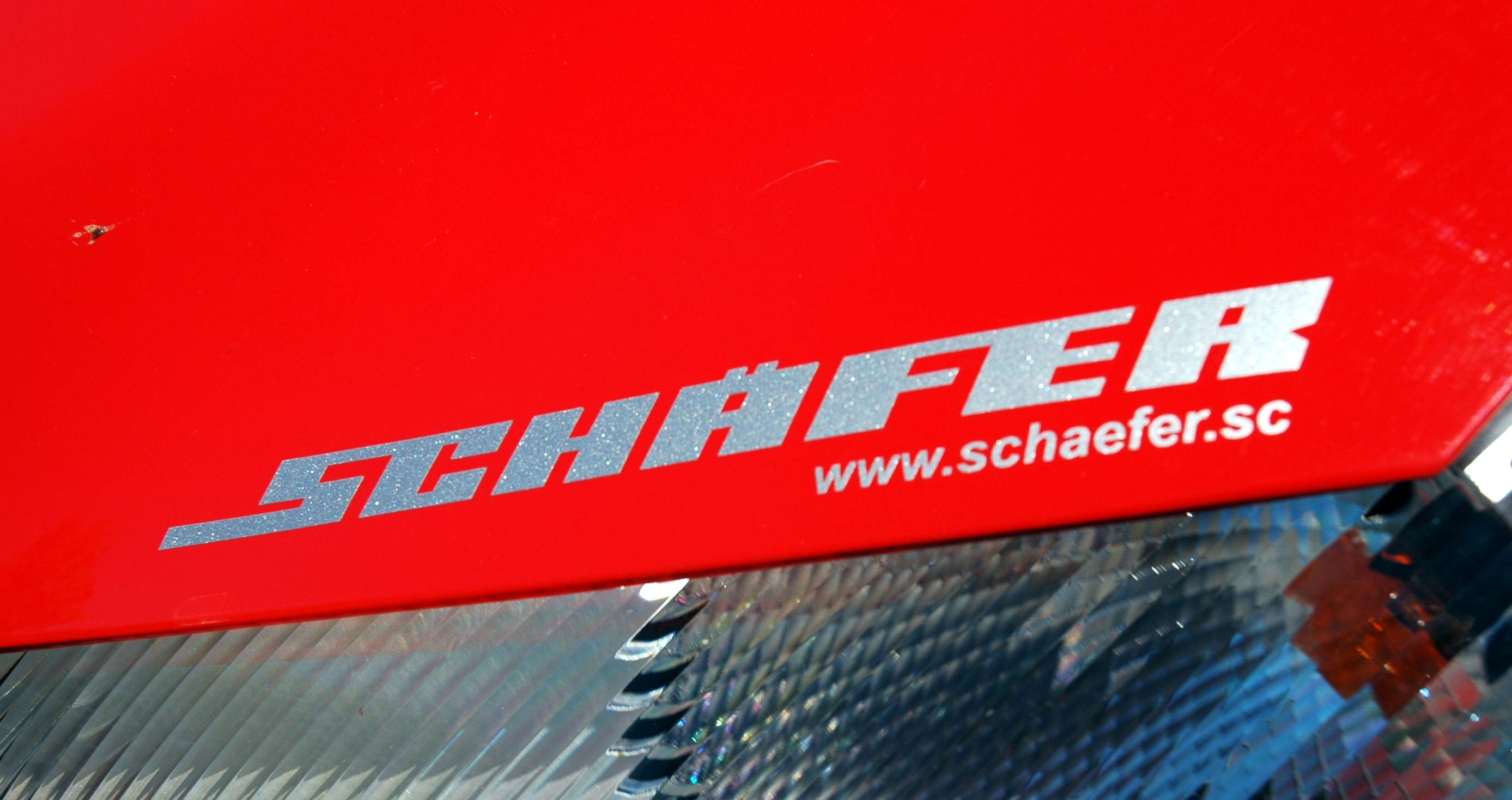 Mosbach - Schäfer Fahrzeugbau Internetsite mit des Staates der Seychellen